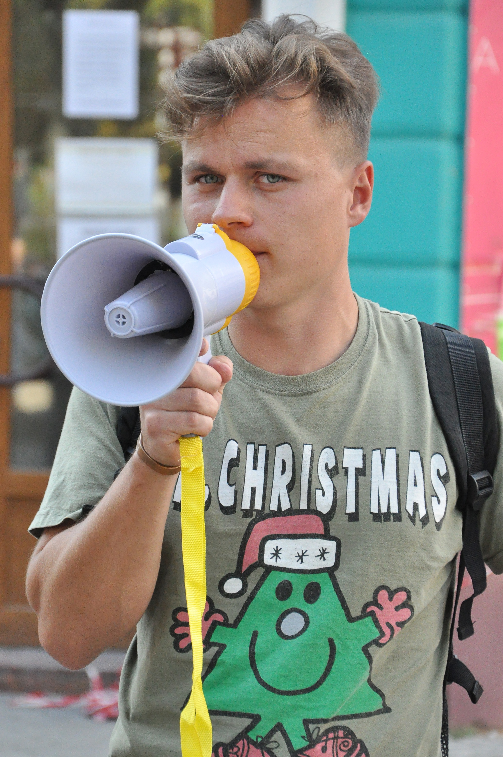 Український краєзнавець, екскурсовод, музикант Тарас Циклиняк.